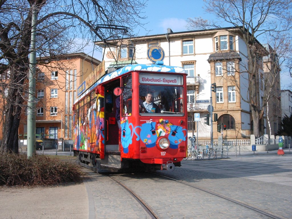 Fotografiert und zuerst hochgeladen von Philipp Gross. Ebbelwei-Express am Zoo, Frankfurt am Main, 15.03.2003 Selbst fotografiert photographer and first uploader: Philipp Gross. Histry de.wikipedia: 15:31, 1. Dez 2004 . . Philipp Gross . . 1024 x 768 (259476 Byte) (Ebbelwei-Express am Zoo, Frankfurt am Main, 15.03.2003)